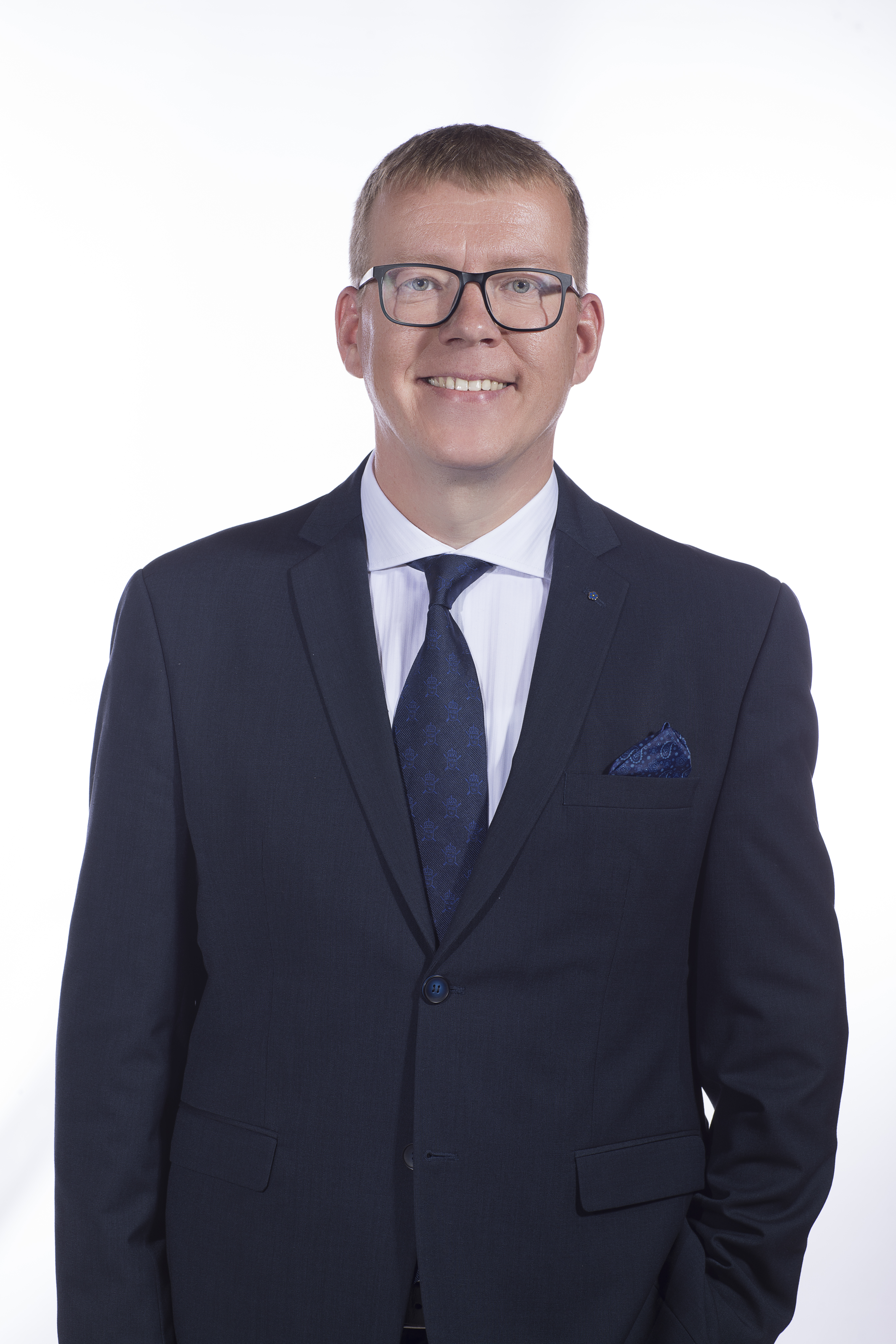 Lauri Tabur